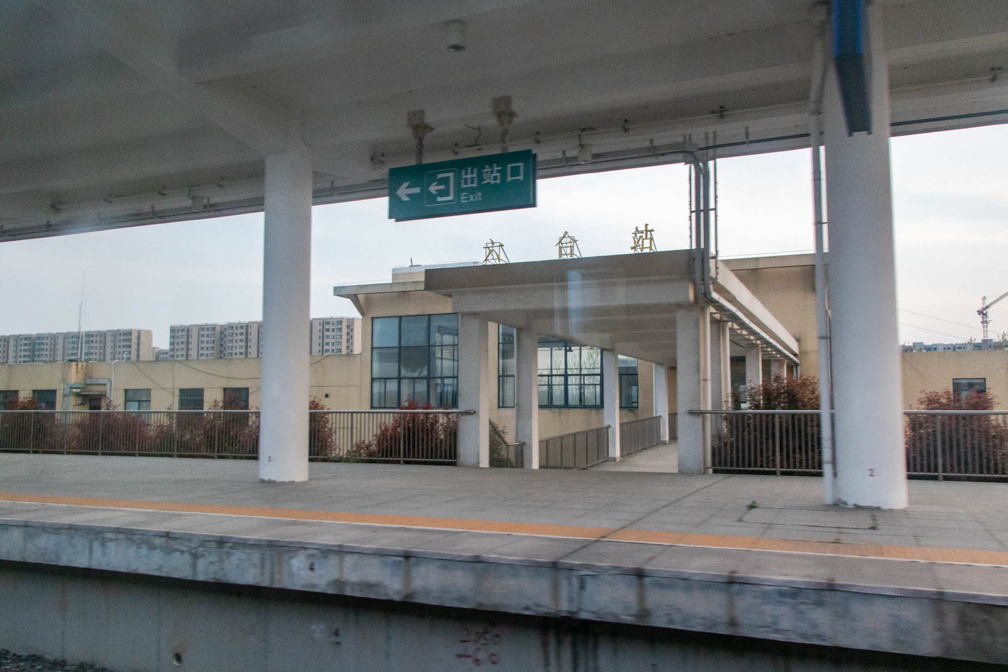 中文（中国大陆）: 中国铁路宁启线六合站